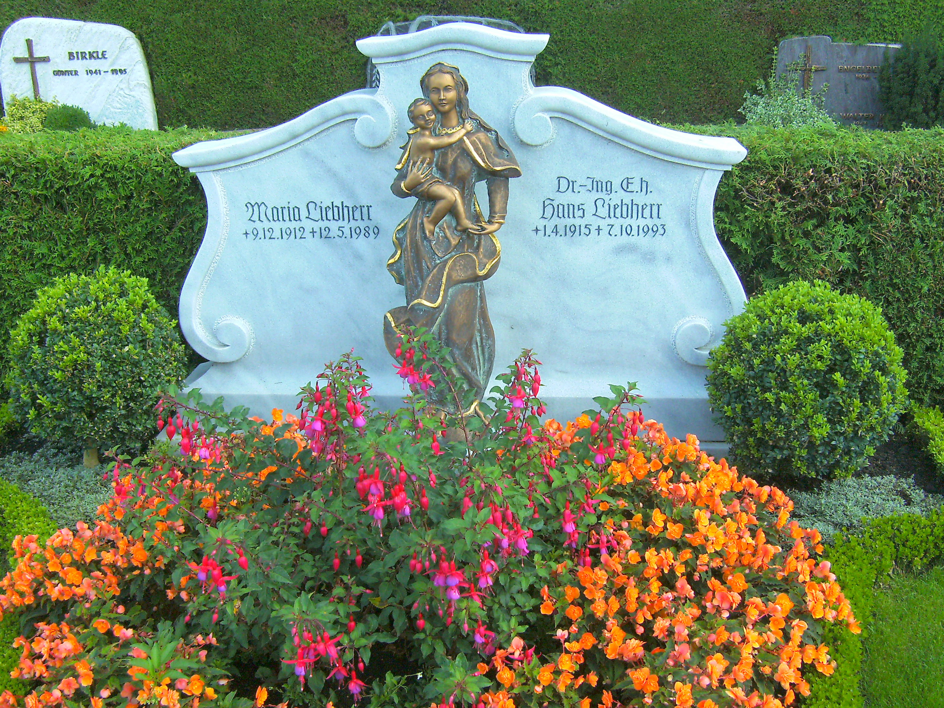 Grabstätte von Hans und Maria Liebherr in Kirchdorf an der Iller